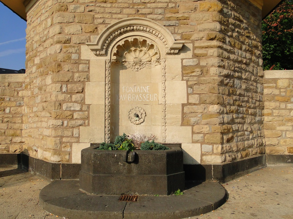 La fontaine au décor richement sculptée est dédiée au souvenir du député et conseiller communal socialiste François Xavier Brasseur (1865-1912) qui s'était au début du 20e siècle prononcé fermement pour la création du Lycée de jeunes filles (aujourd’hui Lycée Robert-Schuman). La fontaine a été construite à la même époque que le lycée (1922-1926) par Nicolas Petit d'après un modèle du sculpteur Jean-Baptiste Wercollier. Elle fut inaugurée le 15 août 1926.